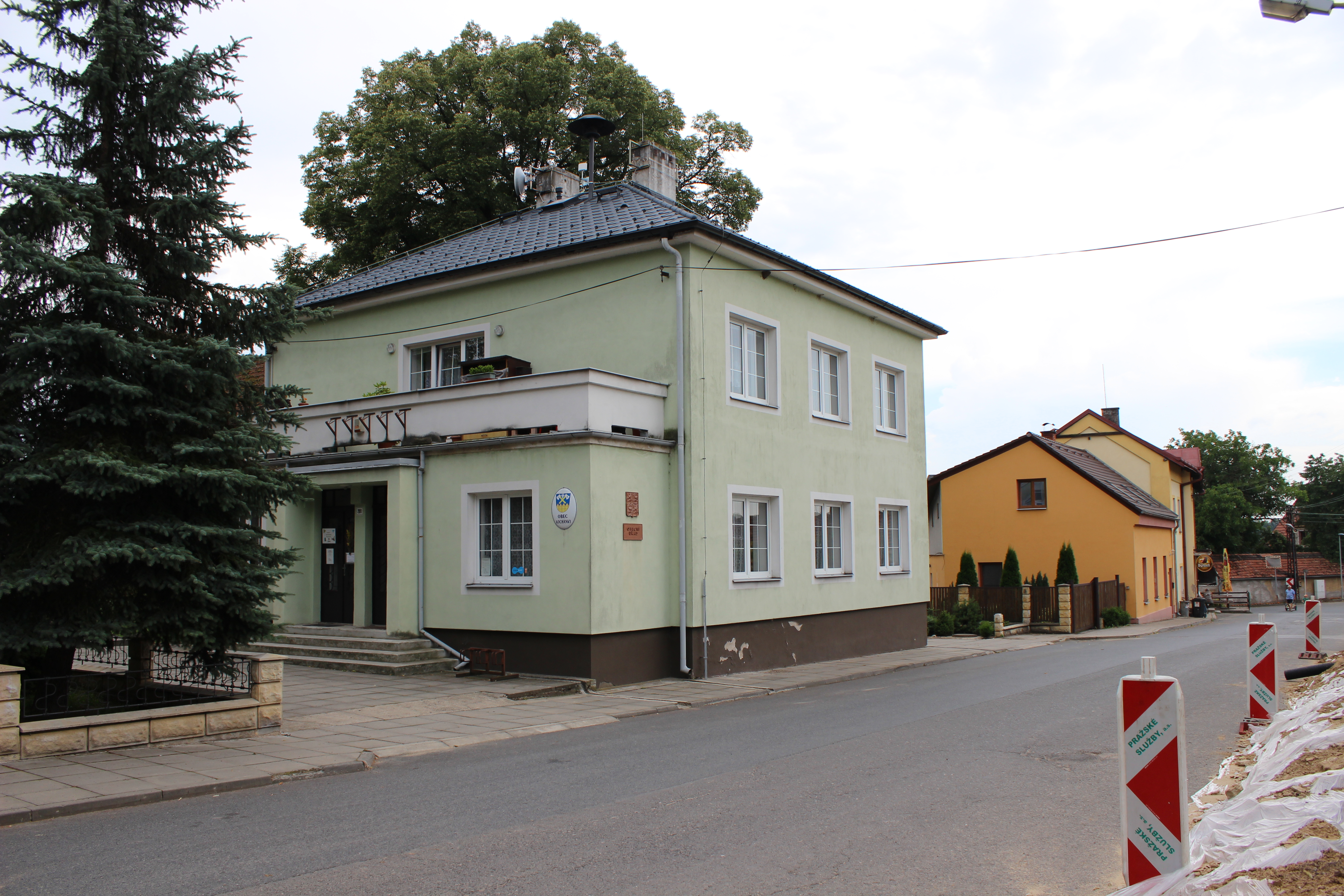 Budova obecního úřadu (dům číslo popisné 201) v Kochánkách (pohled od severu).